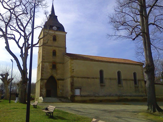 Photo de l'église en hiver